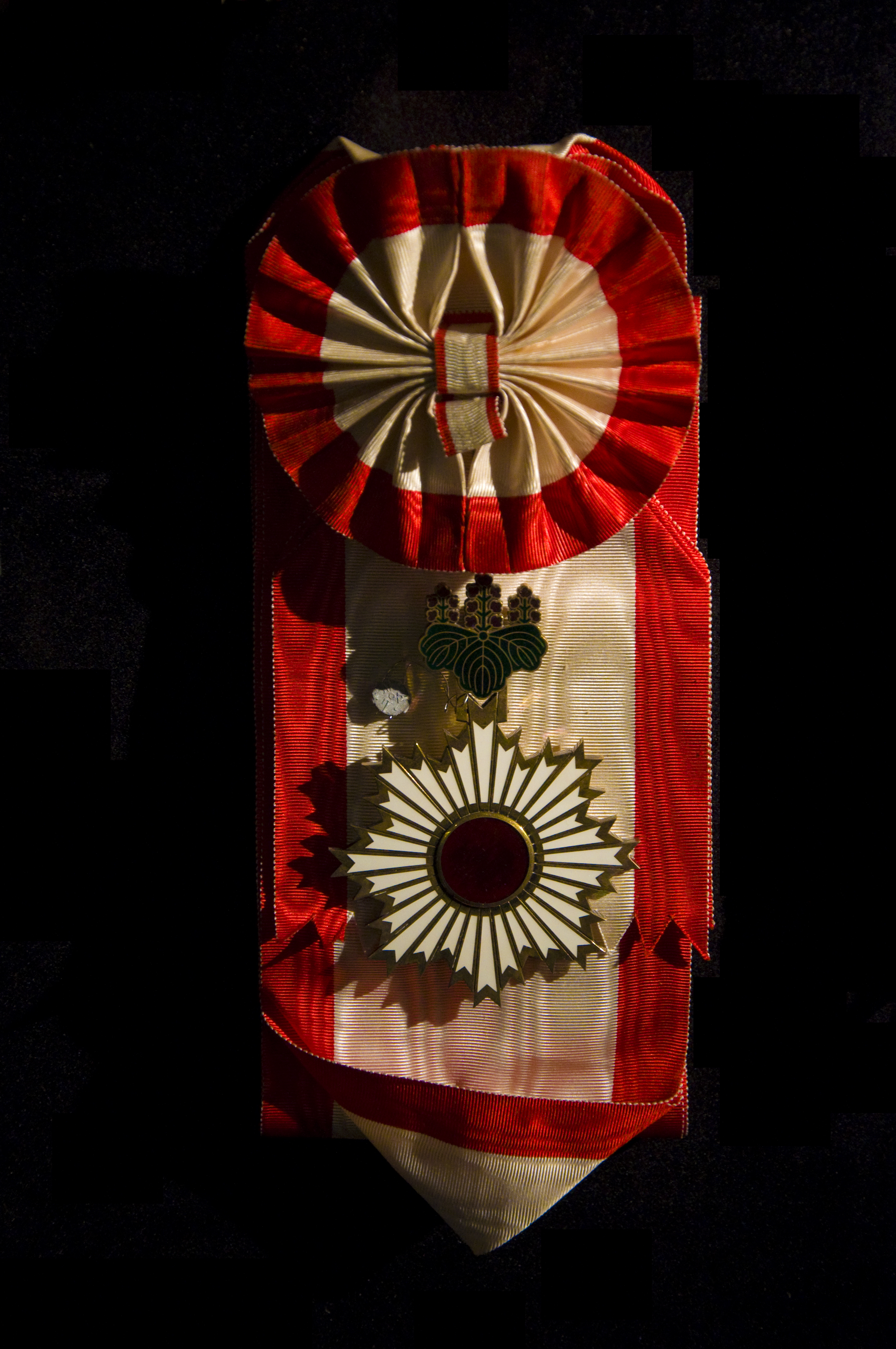 Orde van de Rijzende Zon (Japan) in het Grand Curtius te Luik, België